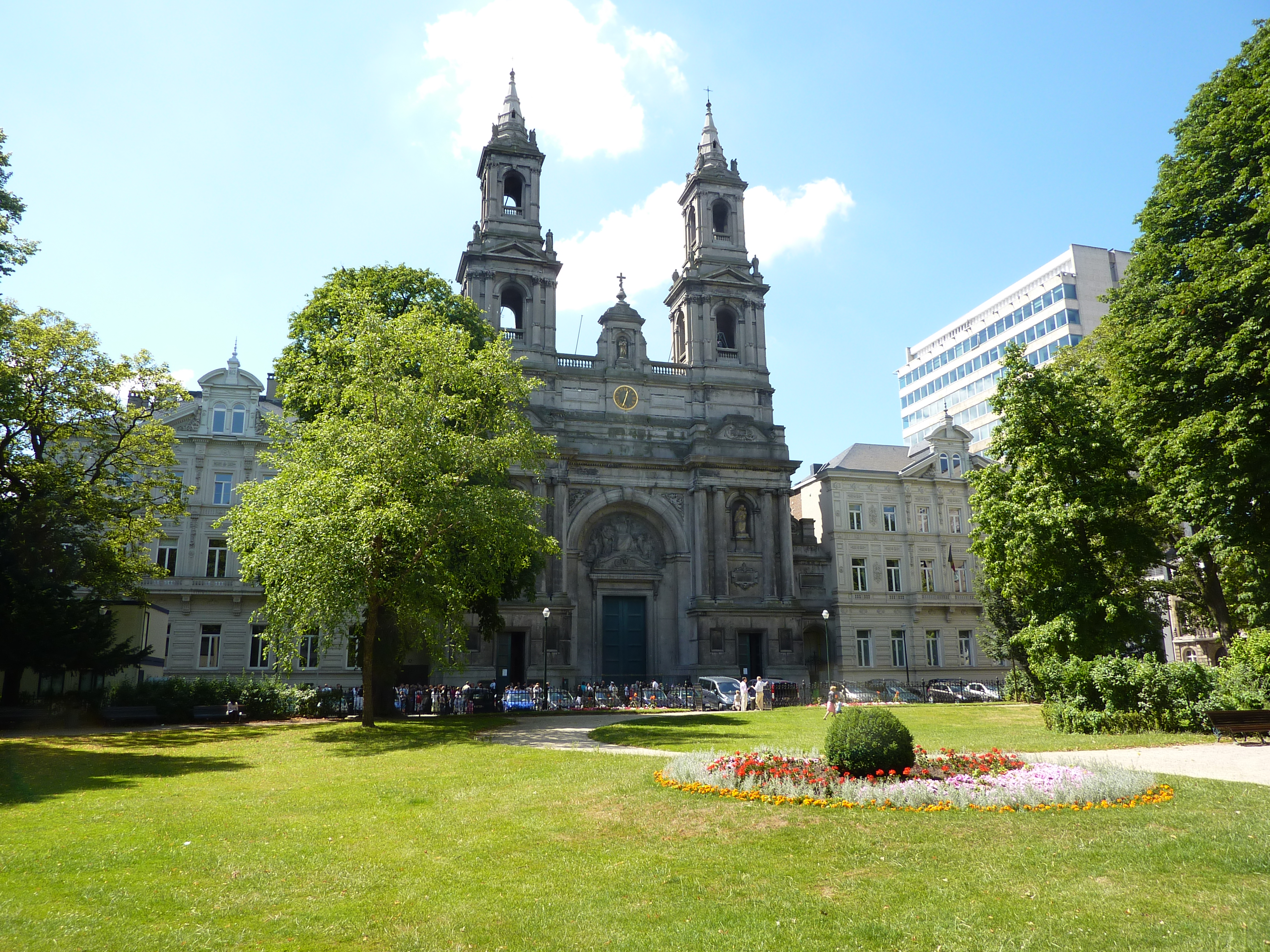 "Église Saint-Joseph" à Bruxelles-ville, Belgique.